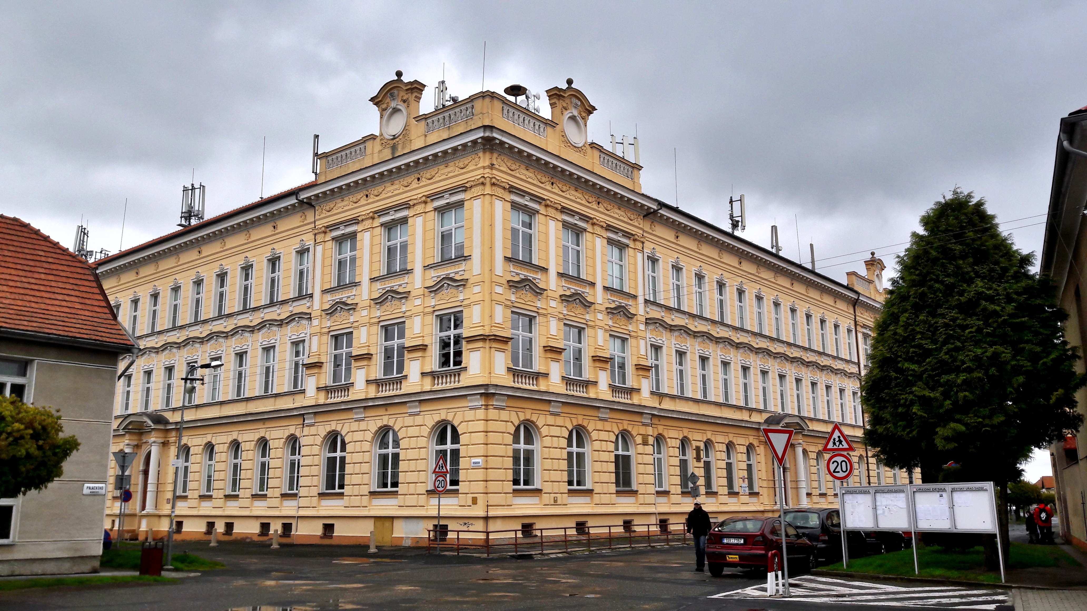 Sadská